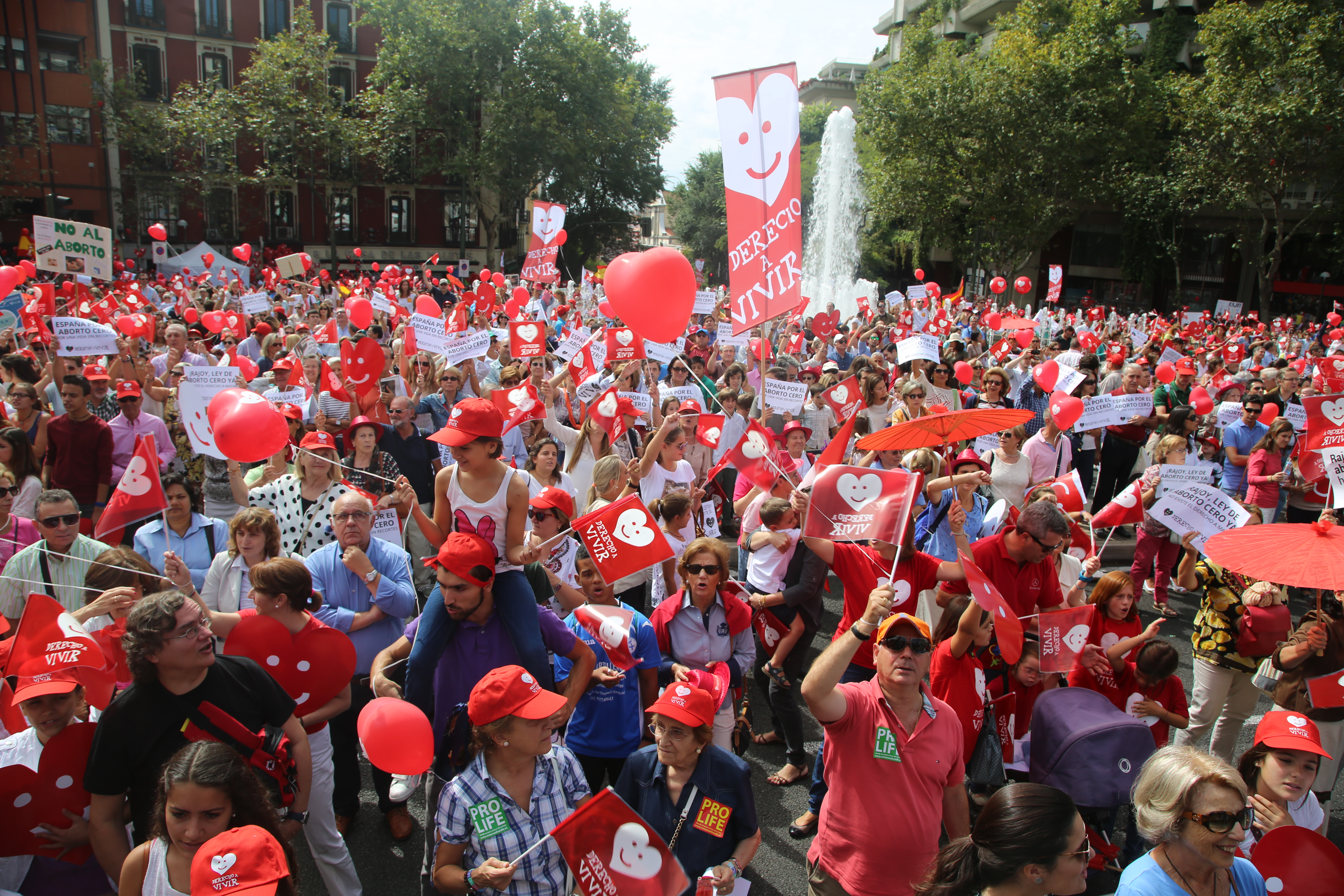 Miles de personas se han congregado en la V Marcha por la Vida en Madrid para defender el derecho a vivir de todos los seres humanos.